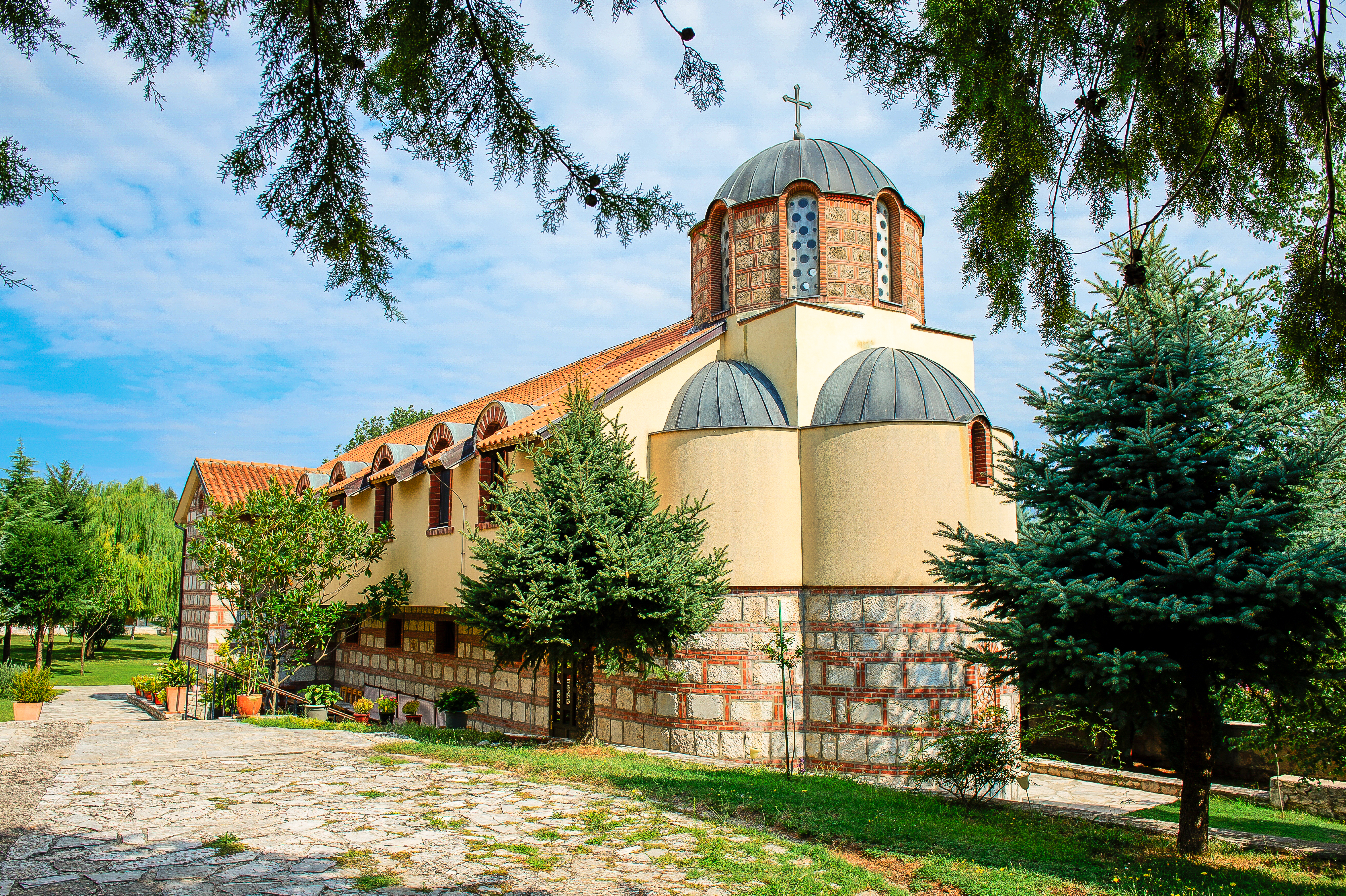 Манастири Републике Српске. This image was uploaded as part of Trace of Soul 2018.